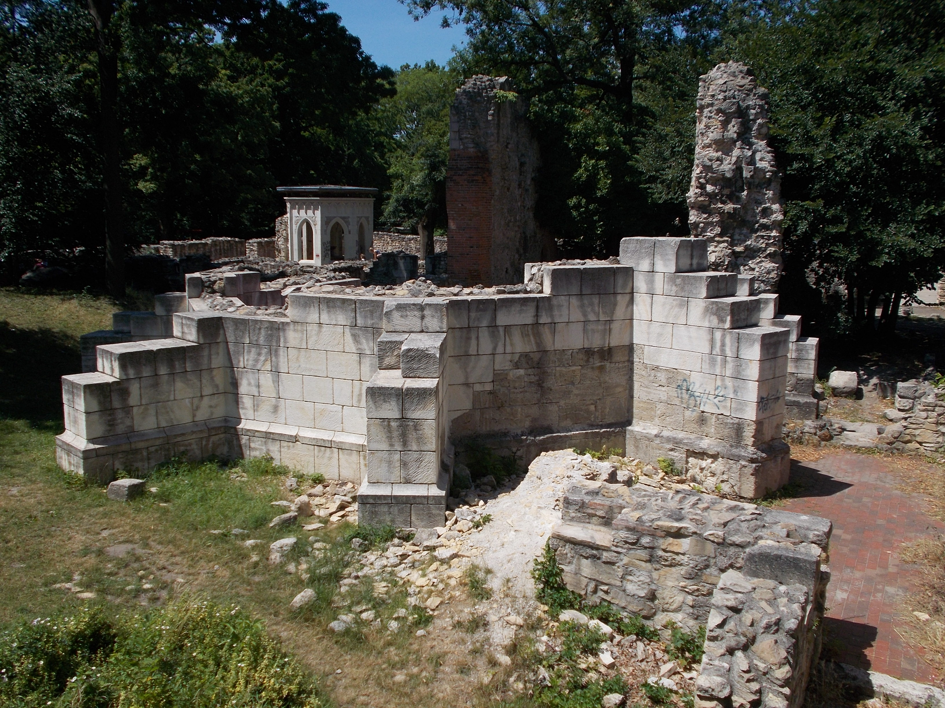 A főkápolna és a kútház. Szűz Mária neve domonkos apácák templomának és kolostorának romjai. (1197. számú műemlék). - Magyarország, Budapest, Margitsziget This is a photo of a monument in Hungary, Identifier: 1197